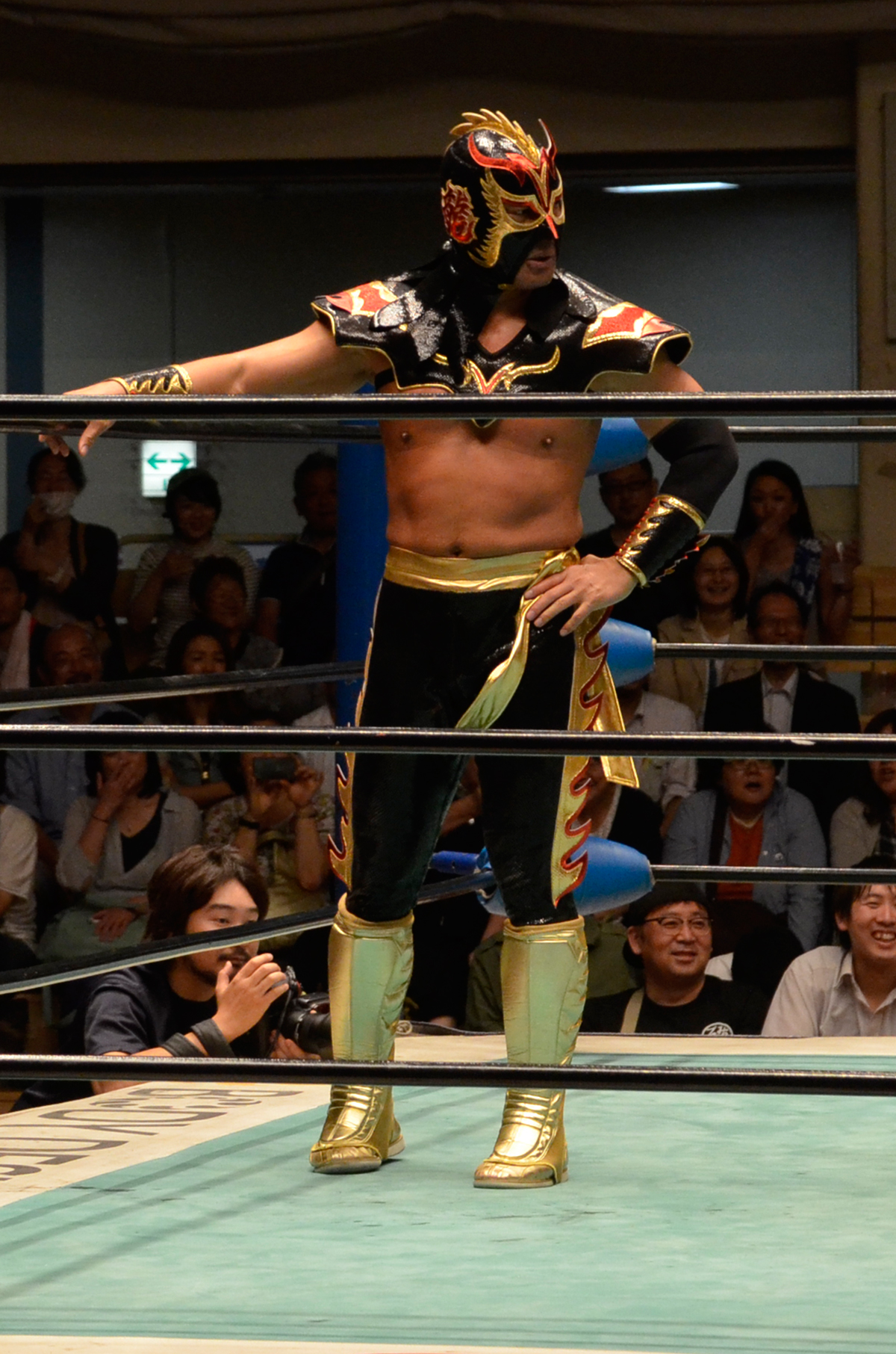 ウルティモ・ドラゴン